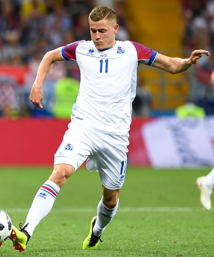 Сборная Исландии уступает Хорватии и покидает ЧМ-2018